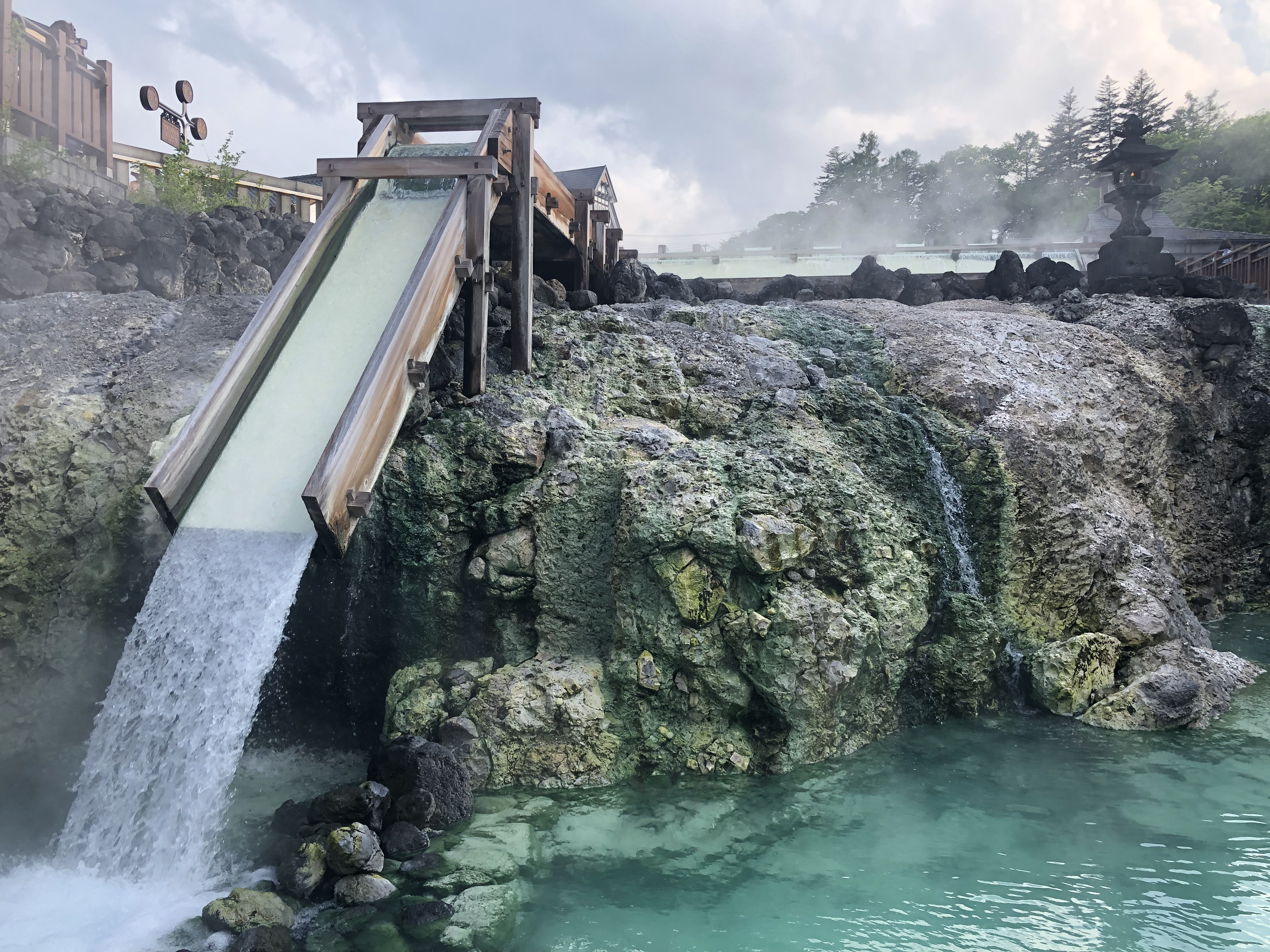 草津温泉 湯畑